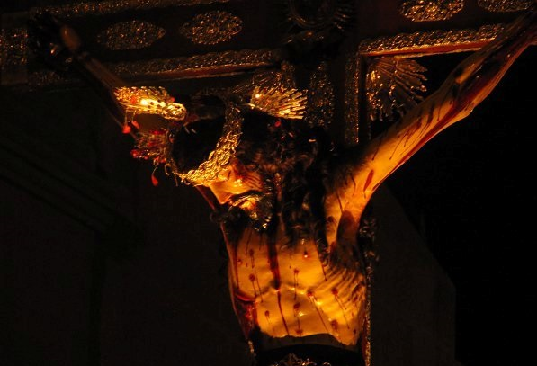 Procesión de Lunes Santo